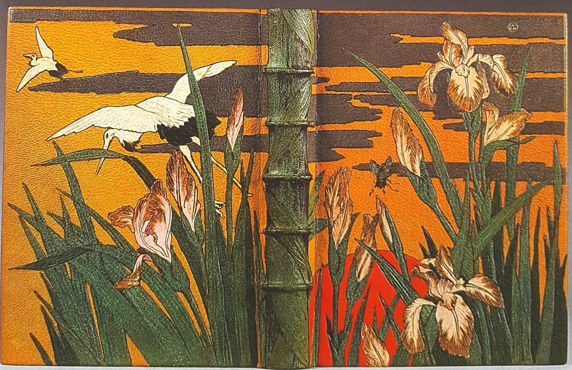 Reliure réalisée par Camille Martin et René Wiener, conservée au musée des Beaux-Arts de Nancy (inv.005-2-2)